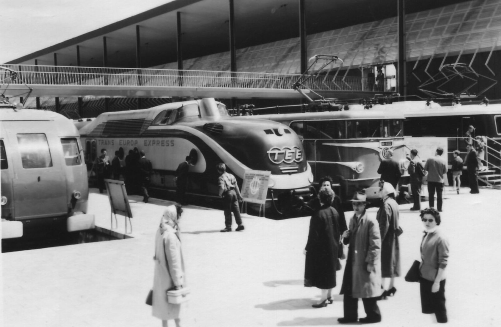 Dieseltriebwagen der Baureihe VT 11.5 der Deutschen Bundesbahn. Weltausstellung 1958 in Brüssel.